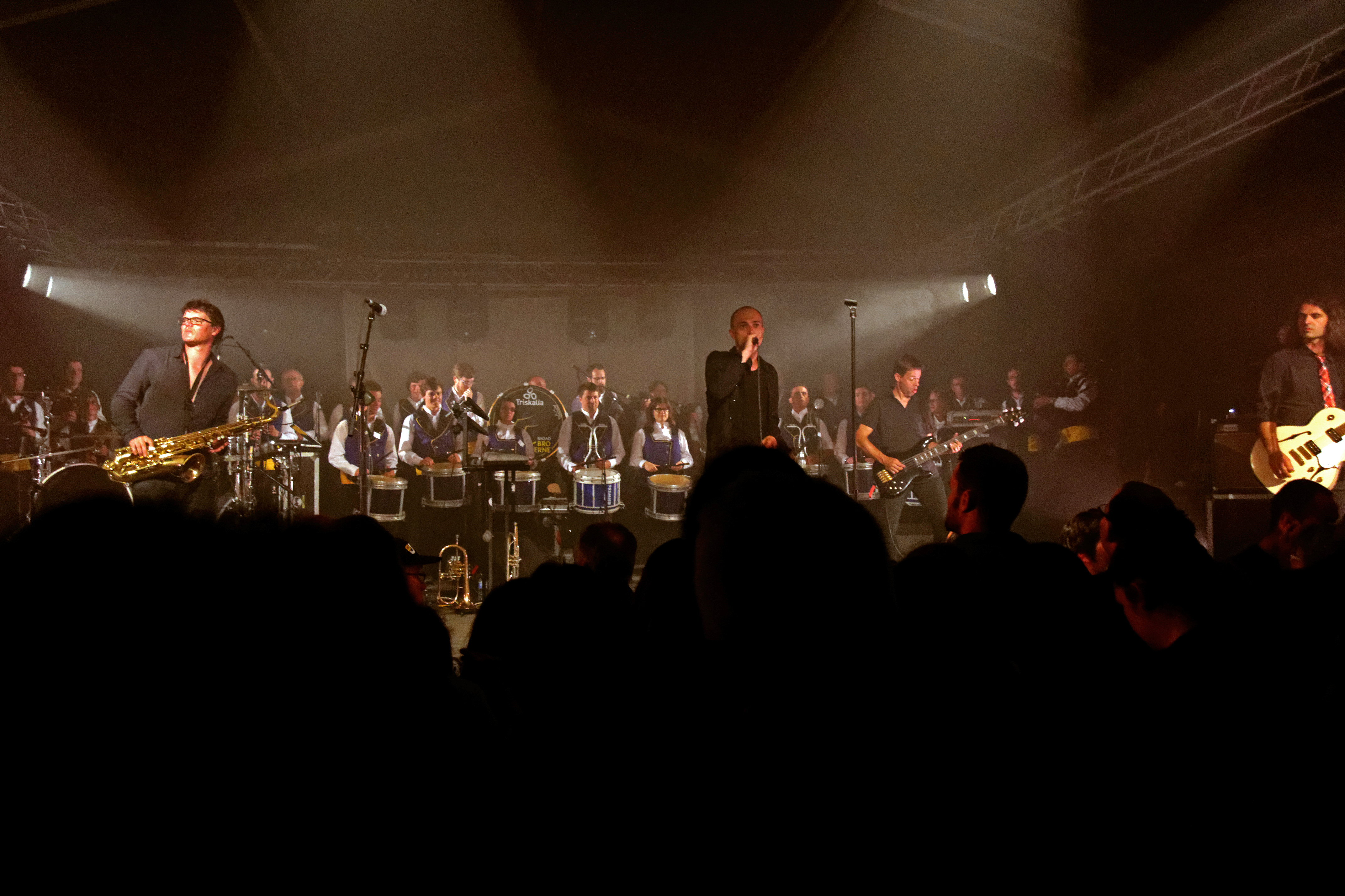 Merzhin en concert pour les 20 ans du bagad Bro Landerne au festival Kan al Loar le 13 juillet 2015.